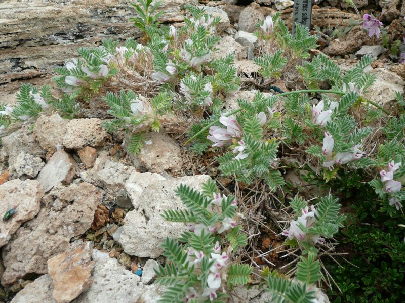 Astragalus sempervirens, Botanischer Garten Erlangen, 2008